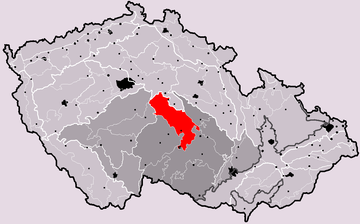 Poloha geomorfologického celku Hornosázavská pahorkatina v rámci České republiky. Hercynský systém Hercynská pohoří I Česká vysočina I2 (II) Česko-moravská subprovincie I2C (IIC) Českomoravská vrchovina I2C-2 (IIC-2) Hornosázavská pahorkatina